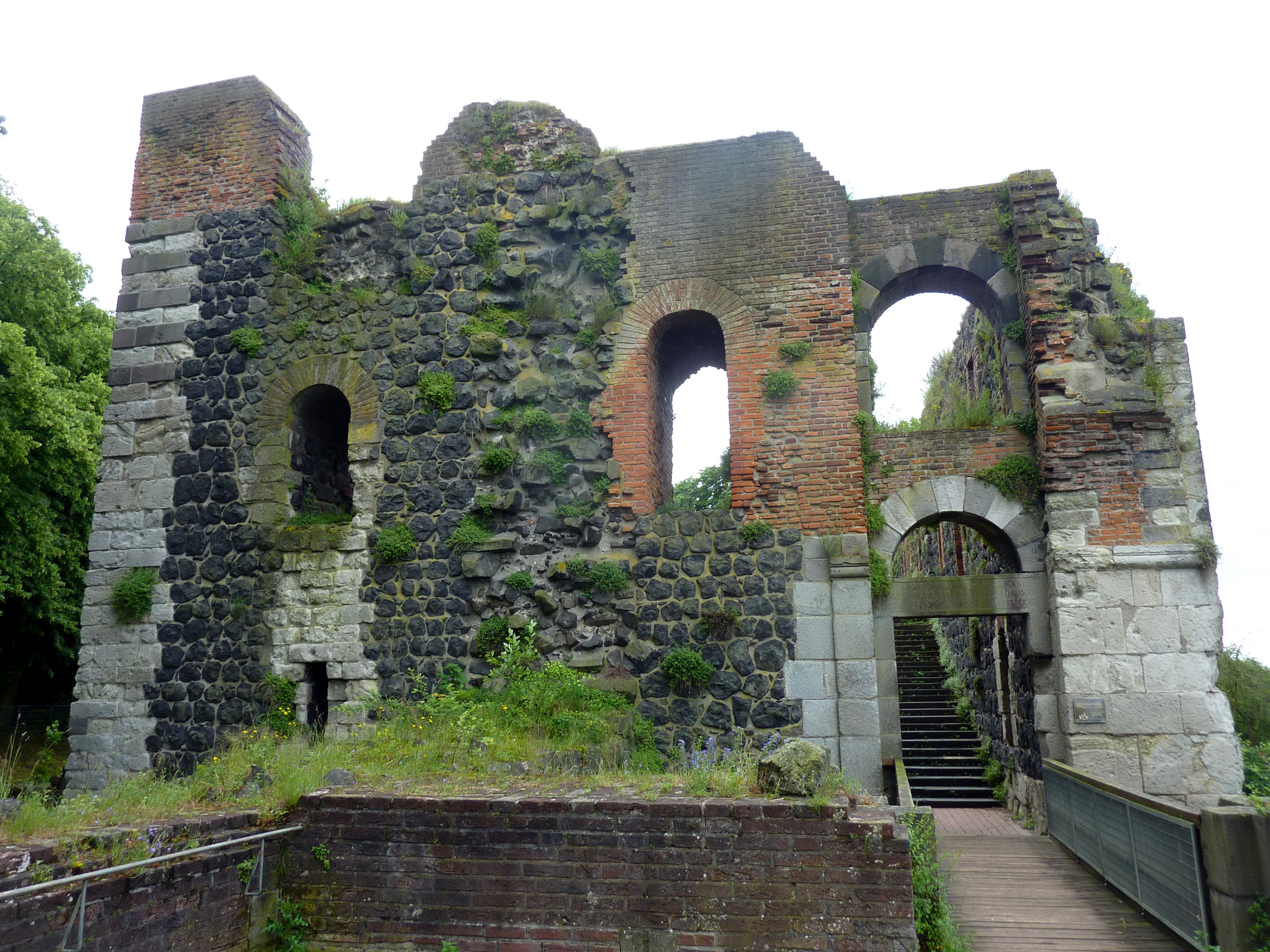 Kaiserswerther Pfalz - Heutiger Eingang